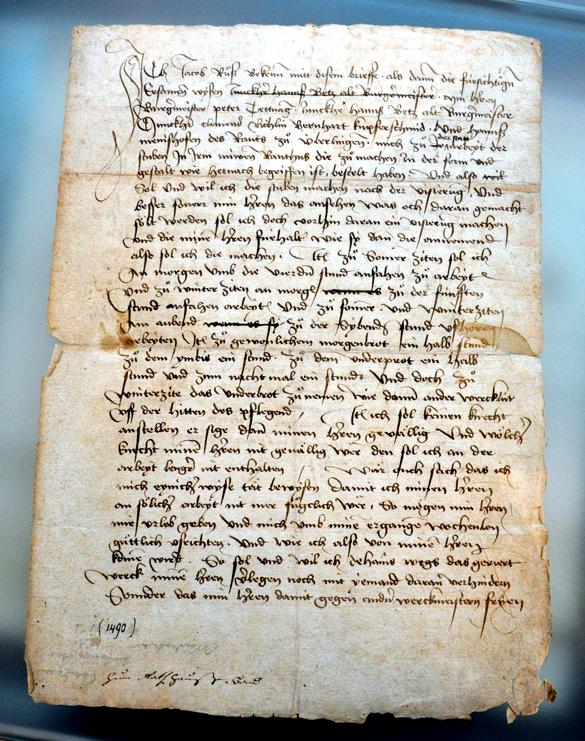 Vertragsentwurf zwischen Jacob Russ und der Stadt Überlingen zur Lieferung der Rathaussaal-Ausstattung, 1490/1491; in Ich-Form aus der Sicht des Künstlers geschrieben; die genannte Zeichnung ist nicht erhalten; Stadtarchiv Überlingen, fotografiert in der Ausstellung "Jacob Russ" im Museum Humpis-Quartier, Ravensburg Transkription